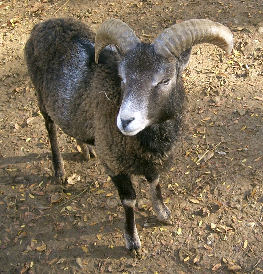 mouflon corse dans un parc animalier. self made PRA